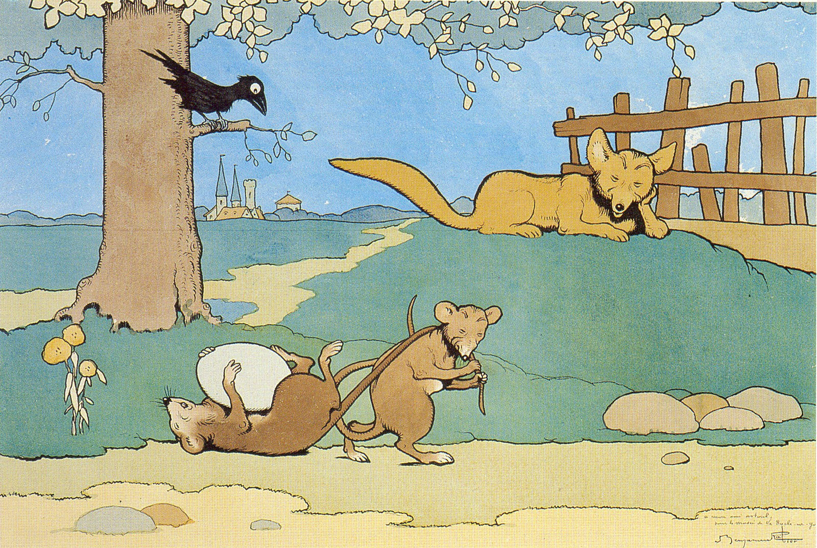 Les deux rats, le renard et l'oeuflabel QS:Lfr,"Les deux rats, le renard et l'oeuf"